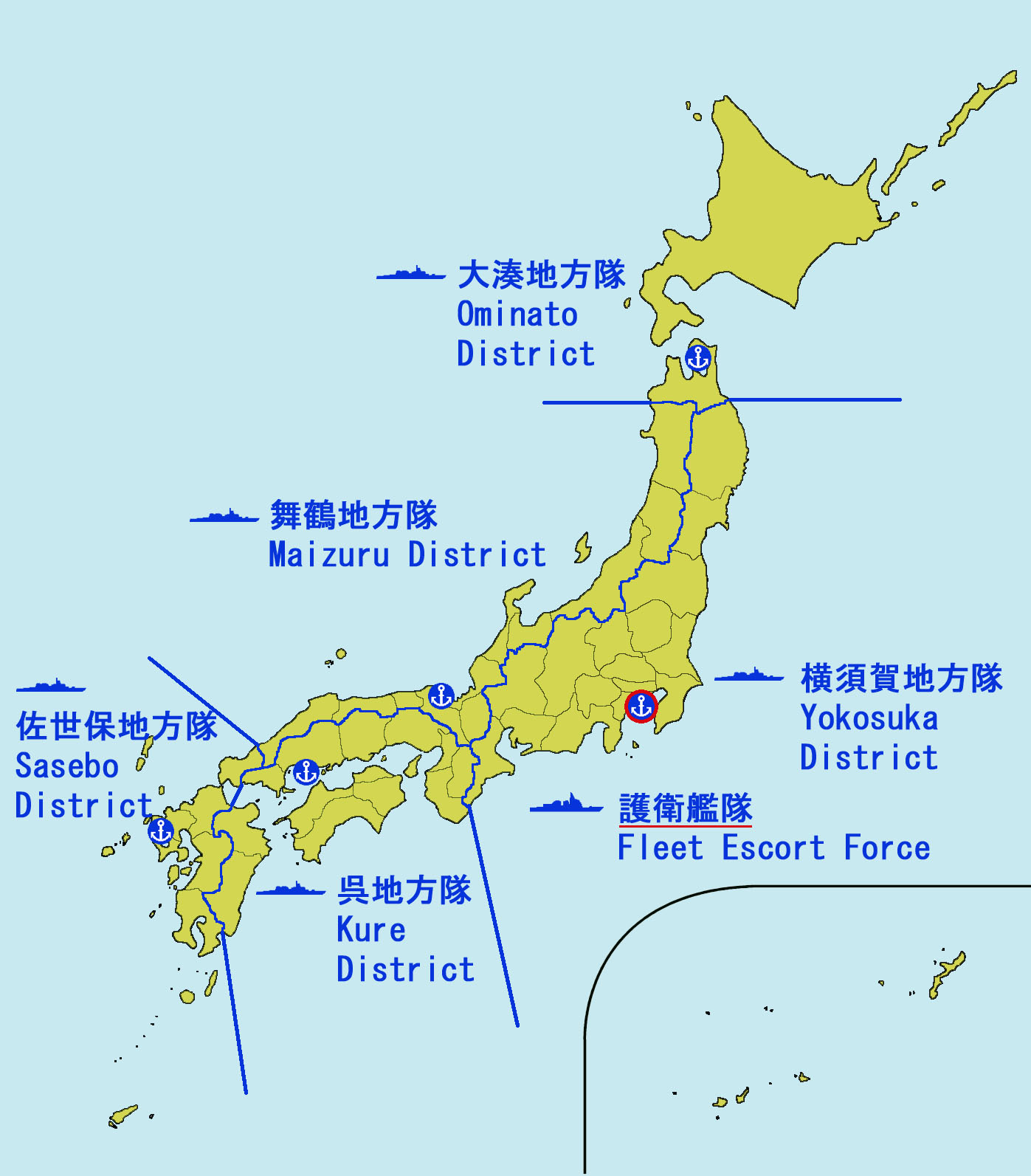 JMSDF major fleets 海上自衛隊・主要水上部隊配置